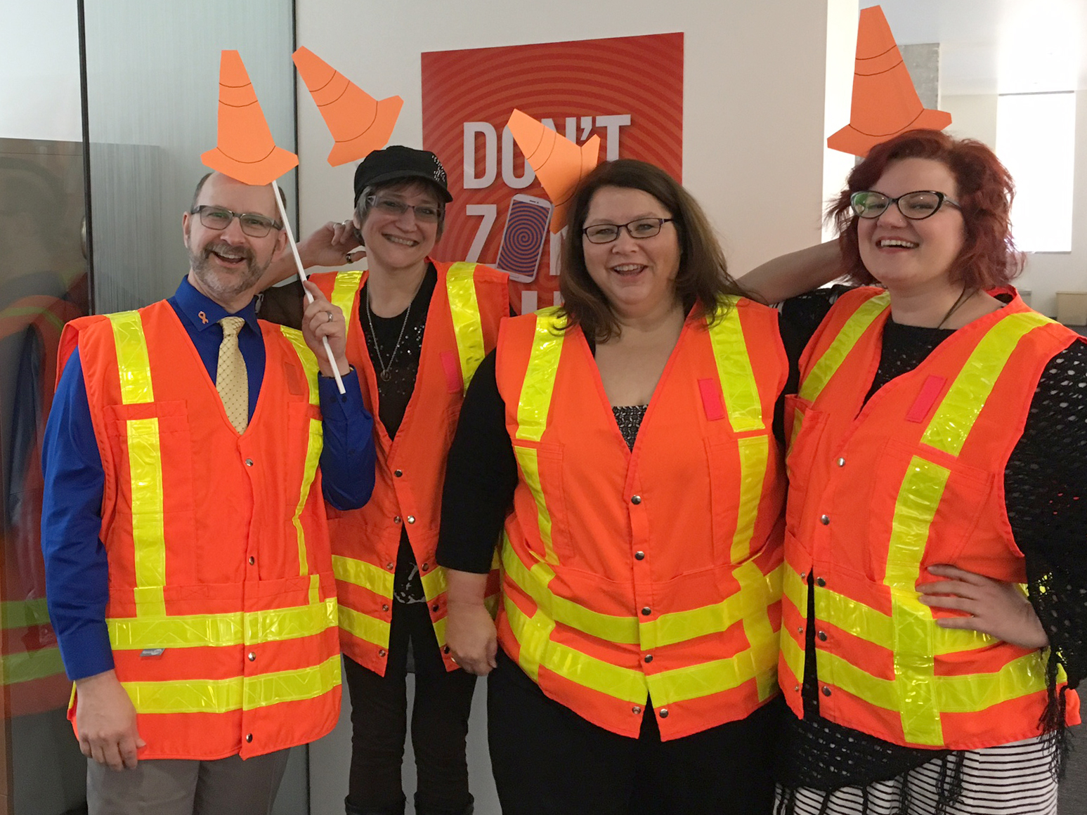 Business Management